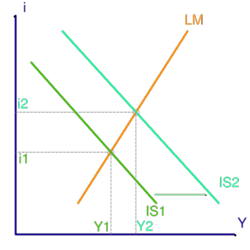 גרף עם עקומות IS ו-LM שבו עקומת IS נעה ימינה. התנועה הזו (הנגרמת משינוי חיצוני למודל), מביאה לעליה בשער הריבית ולהגדלת התוצר